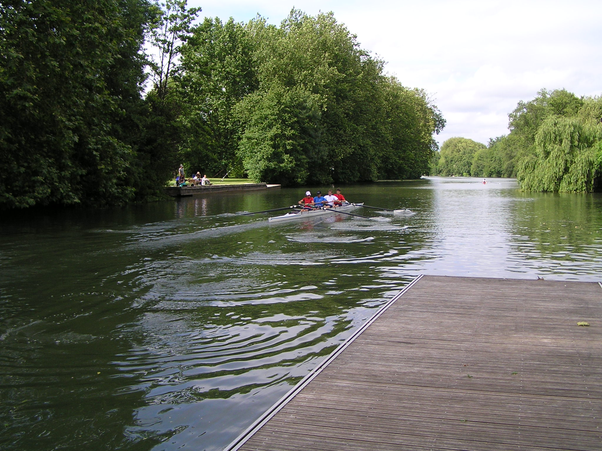 La Charente à Cognac, au CYRC